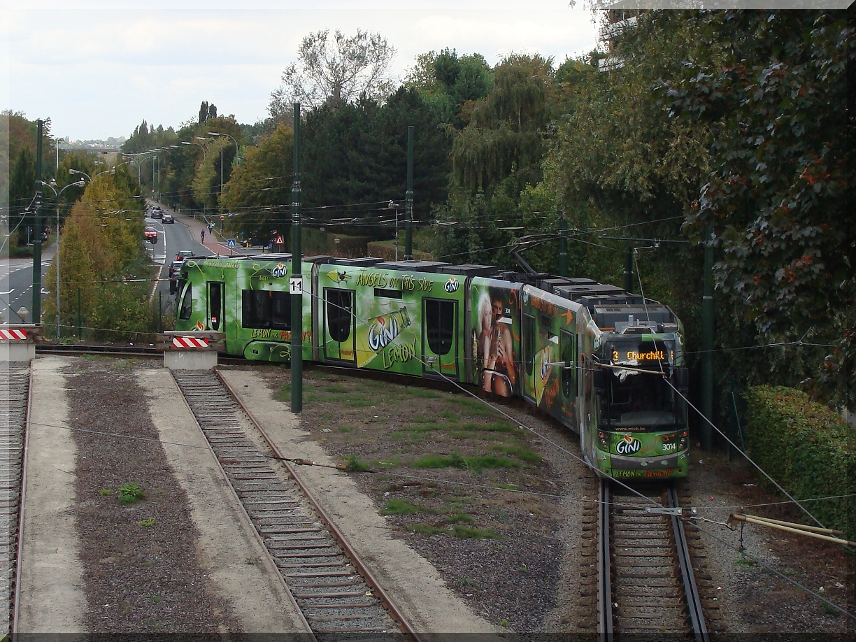 Motrice 3014 sur l'Esplanade du Heysel